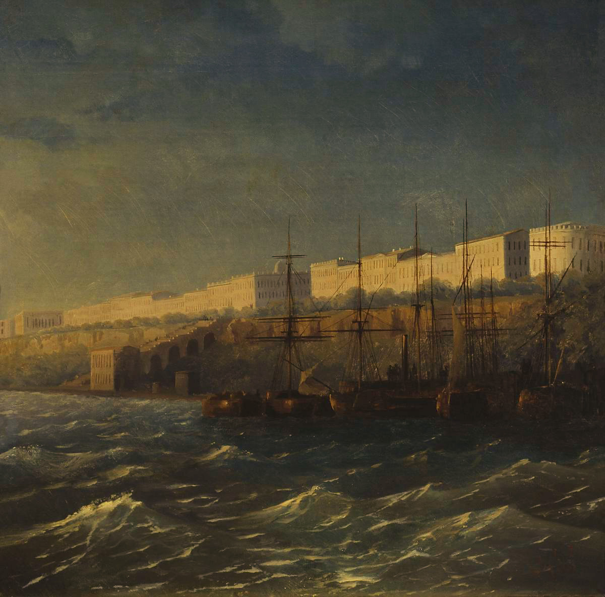 Odessa en 1840